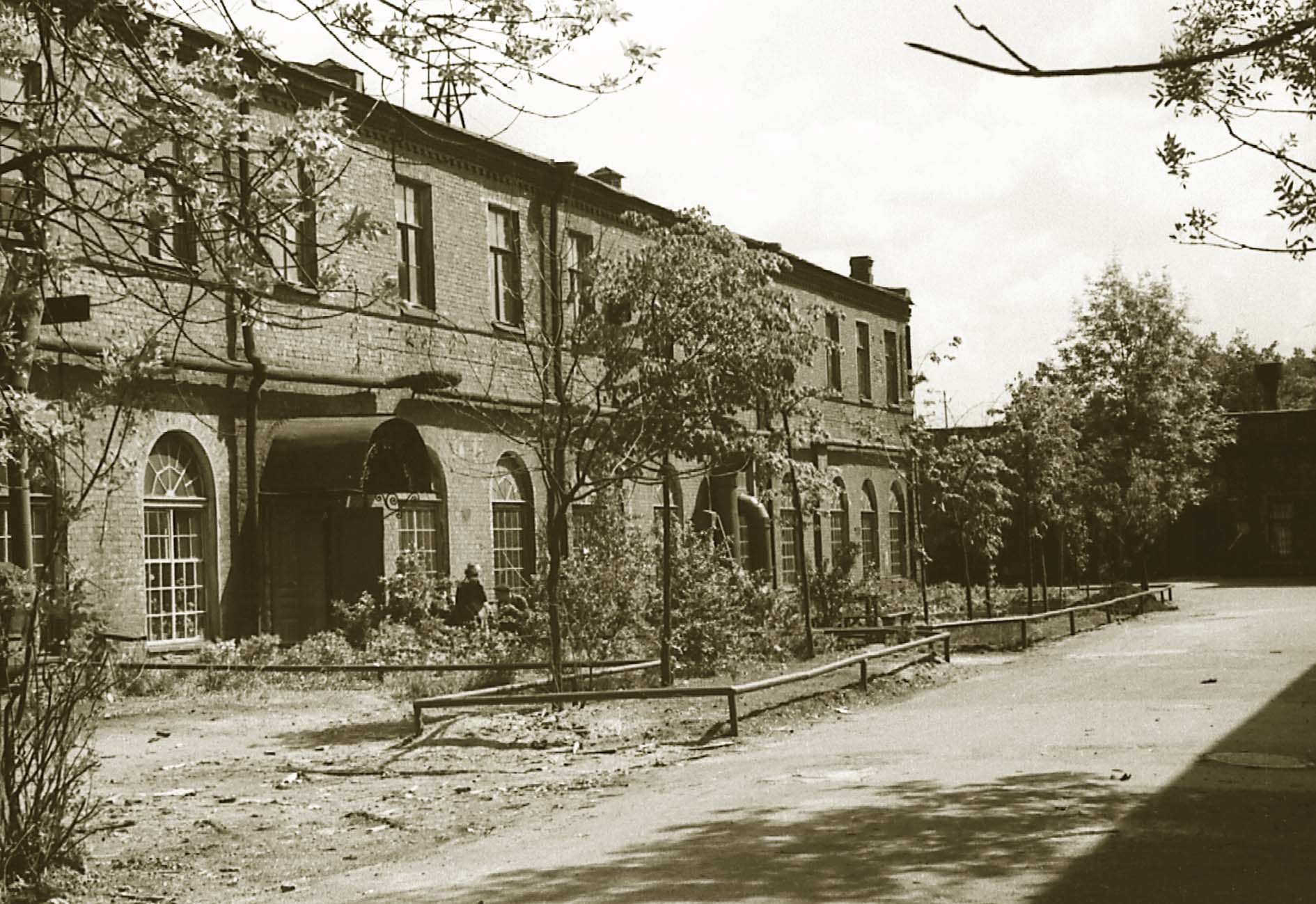 Один из корпусов завода "Красный лётчик" на Ушаковской наб., д. 1 в Ленинграде